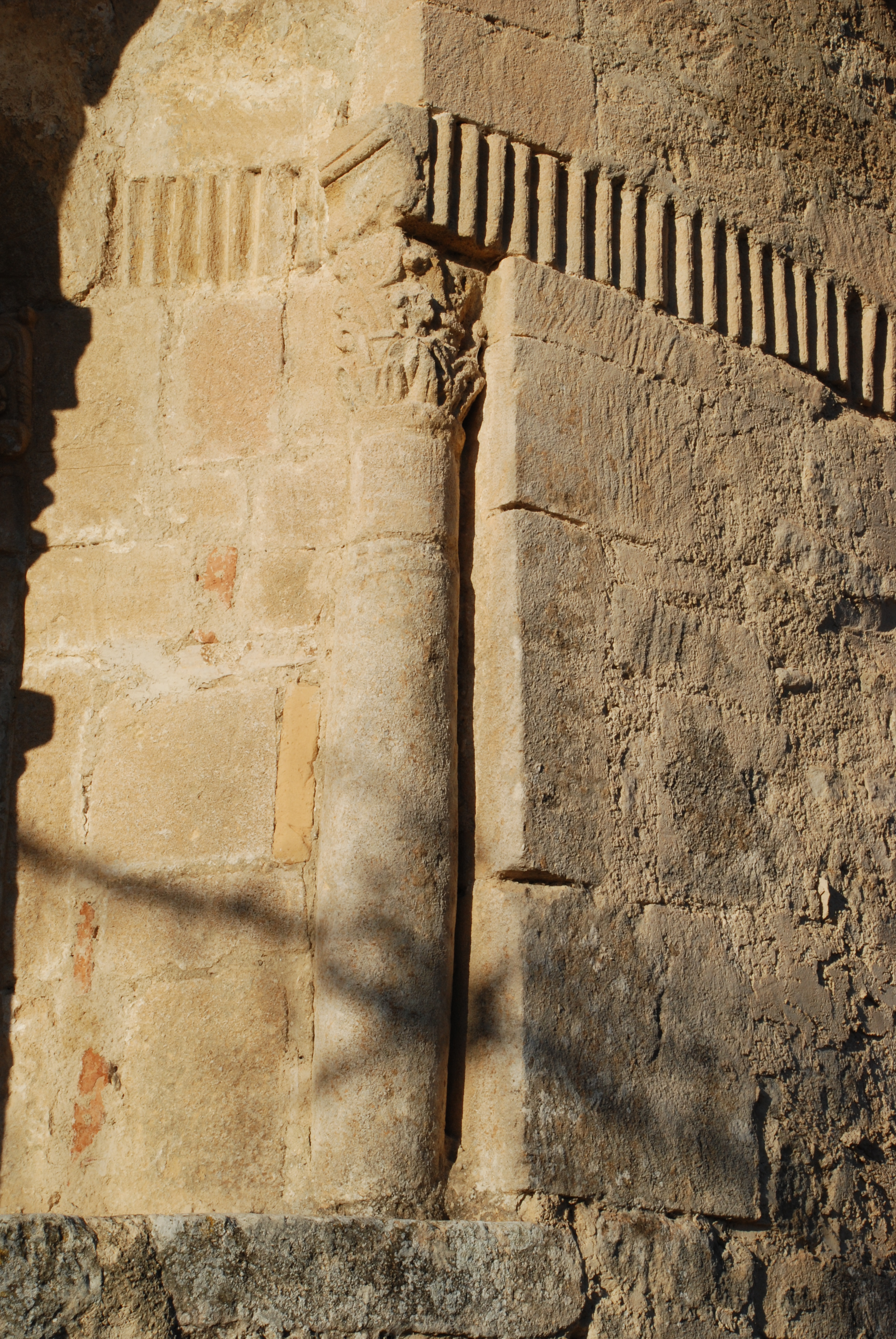 France - Provence - Chapelle Saint-Pierre de Pierrerue